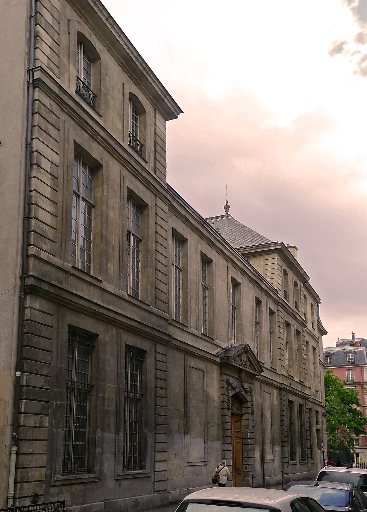 Hôtel Le Peletier de Saint-Fargeau (InscritClassé) - n°29 rue de Sévigné - Paris III .